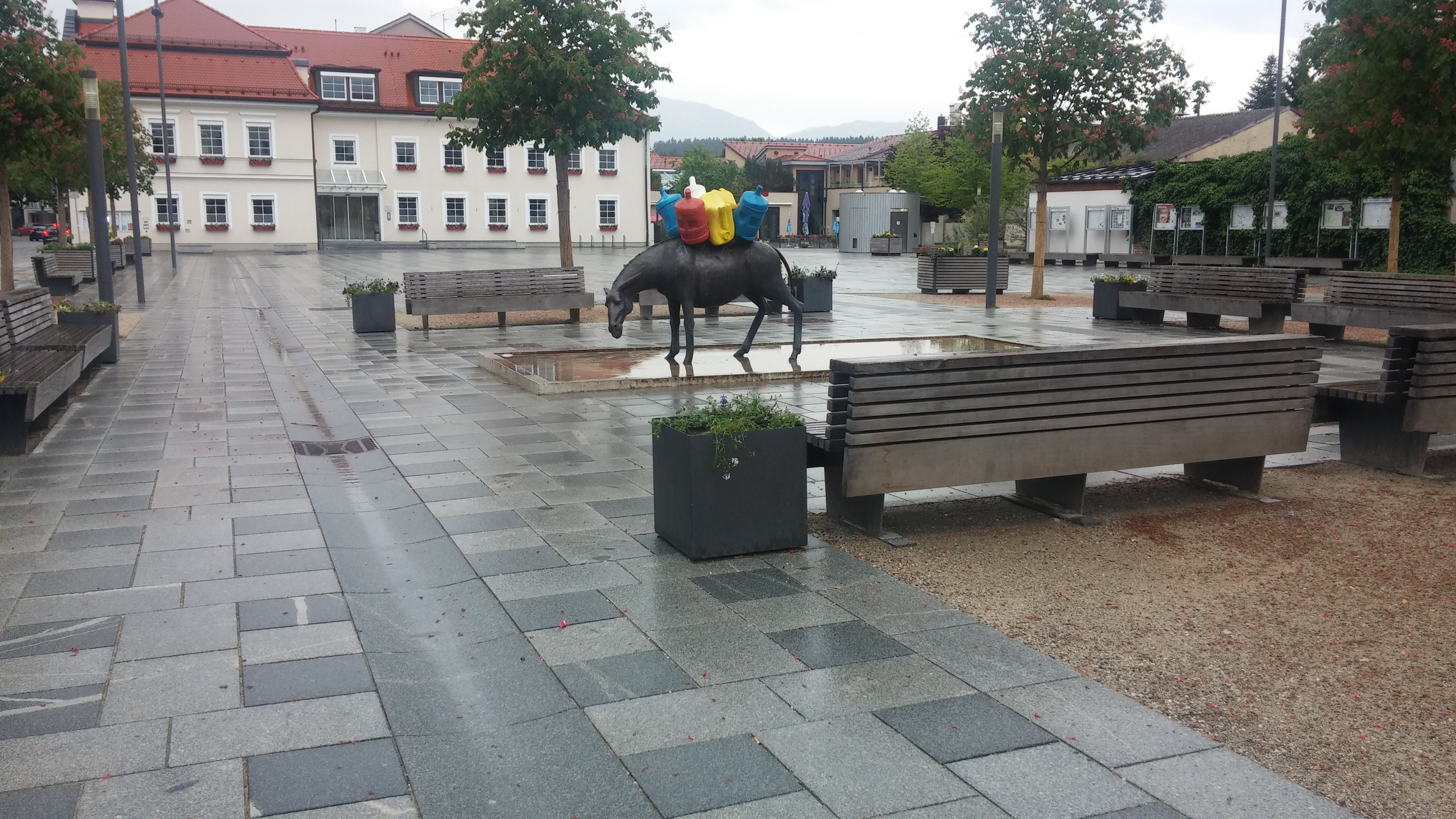 Der Penzberger Stadtplatz mit Eselbrunnen und Rathaus.